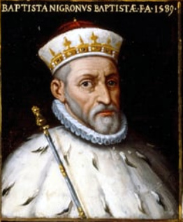 Dipinto del doge Battista Negrone